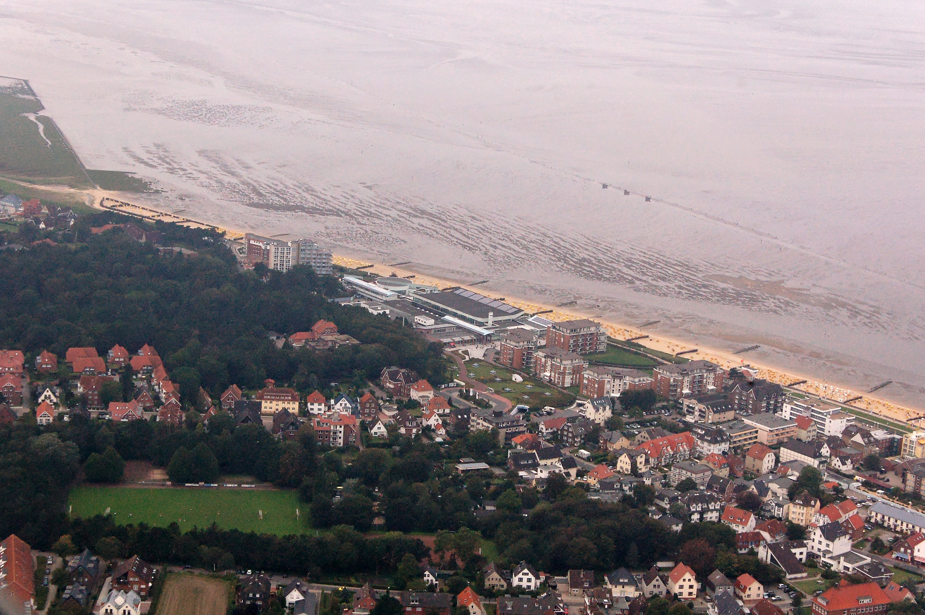 Impressionen Fotoflüge September 2011 (CPB); Cuxhaven-Duhnen Dieses Foto entstand aufgrund eines Projektes, das von Wikimedia Deutschland e. V. gefördert wurde. Im Rahmen des „Community-Projektbudgets“ sollen Luftbilder u.a. von Inseln, Halligen, Sanden und Küstenstädten der deutschen Nordseeküste angefertigt werden. Das Projekt „Fotoflüge“ wurde im September 2011 begonnen.